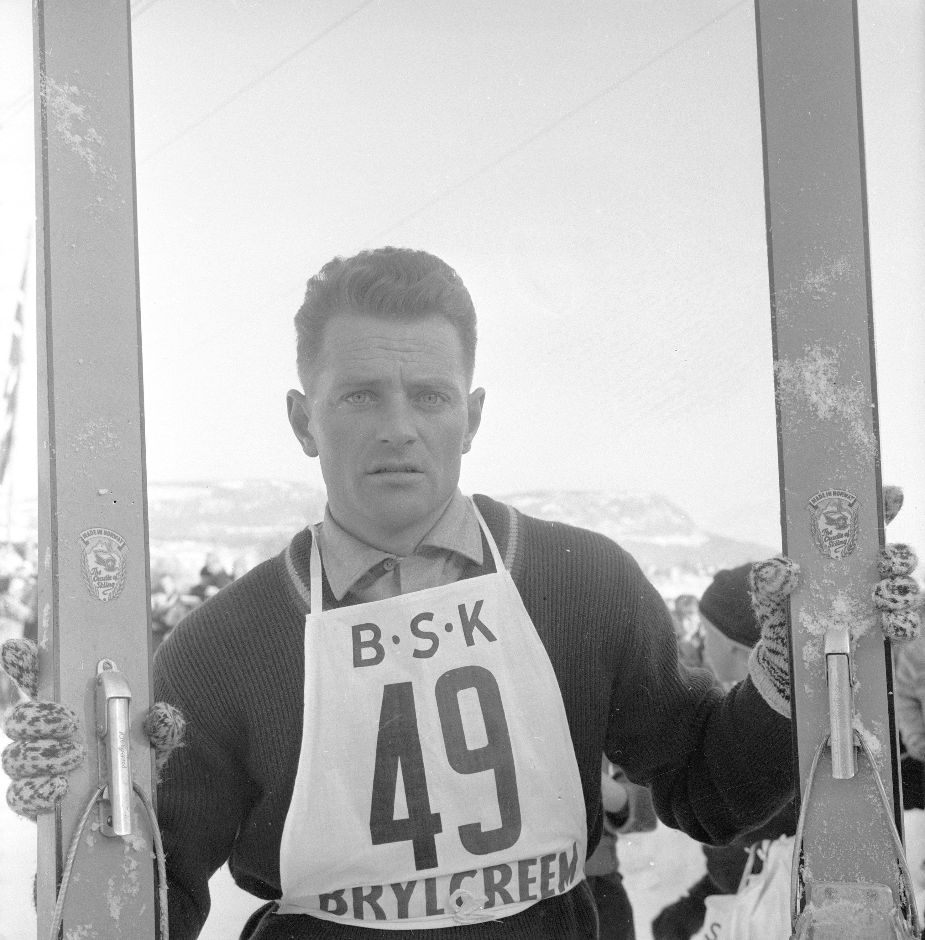 Arnfinn Bergmann